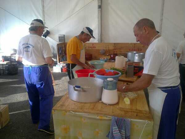 Feira do Bonito, Burela